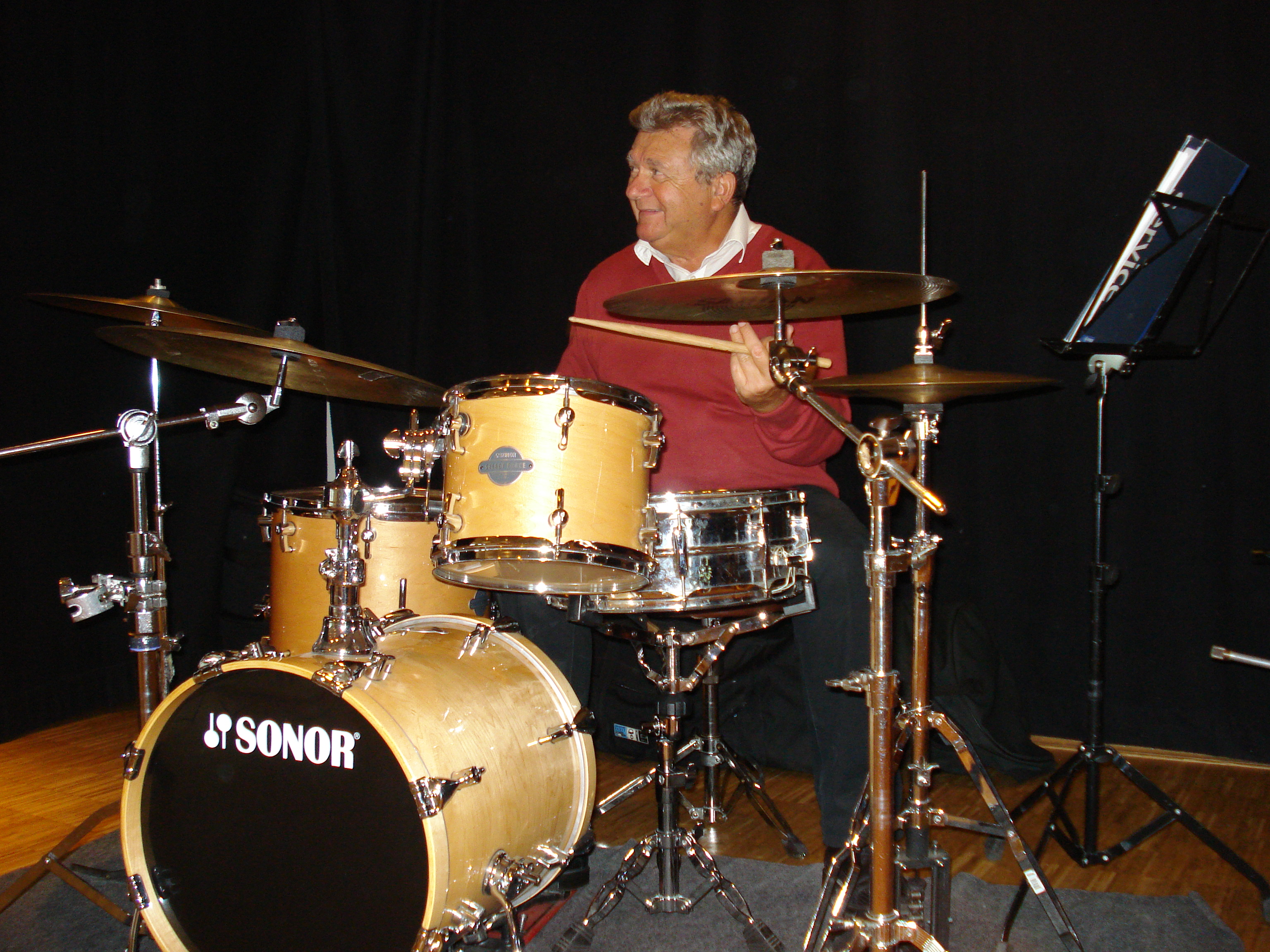 Tommy Rosenberg at the drums